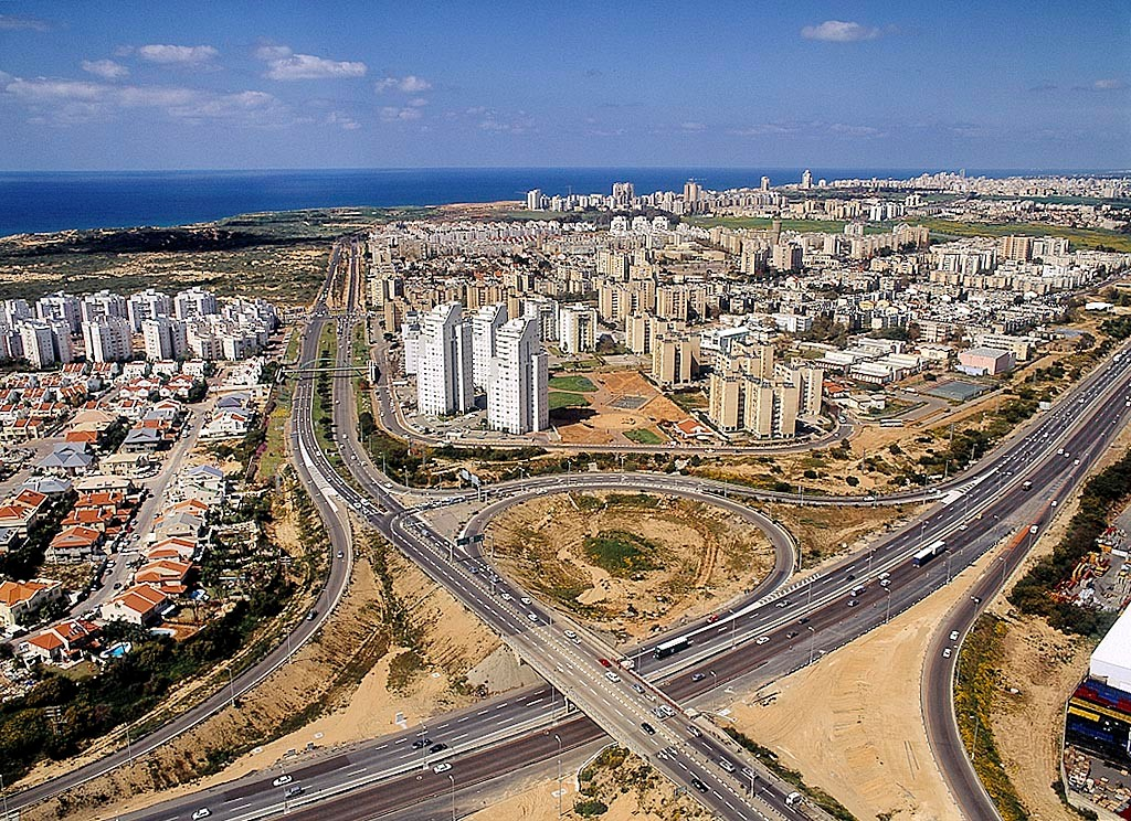 מחלף פולג - צילום אויר מרץ 2004